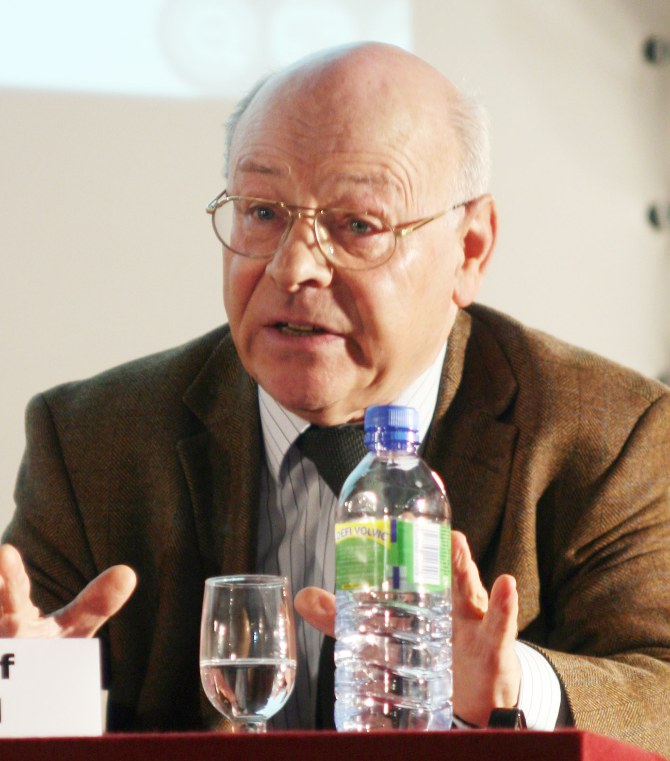 Krzysztof Pomian le 4 novembre 2009 lors du colloque international "Sortir du communisme, changer d'époque" organisé par Fondapol en partenariat avec la Fondation Robert-Schuman.